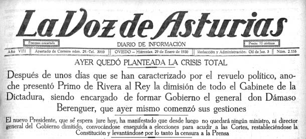 Portada de La Voz de Asturias en 1931.